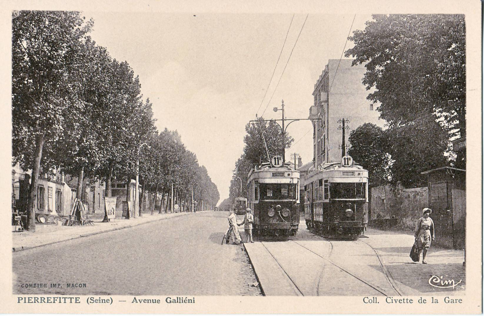 Carte postale ancienne éditée par Combier (CIM) PIERREFITTE - Avenue Galliéni Ligne 11b des tramways de la STCRP